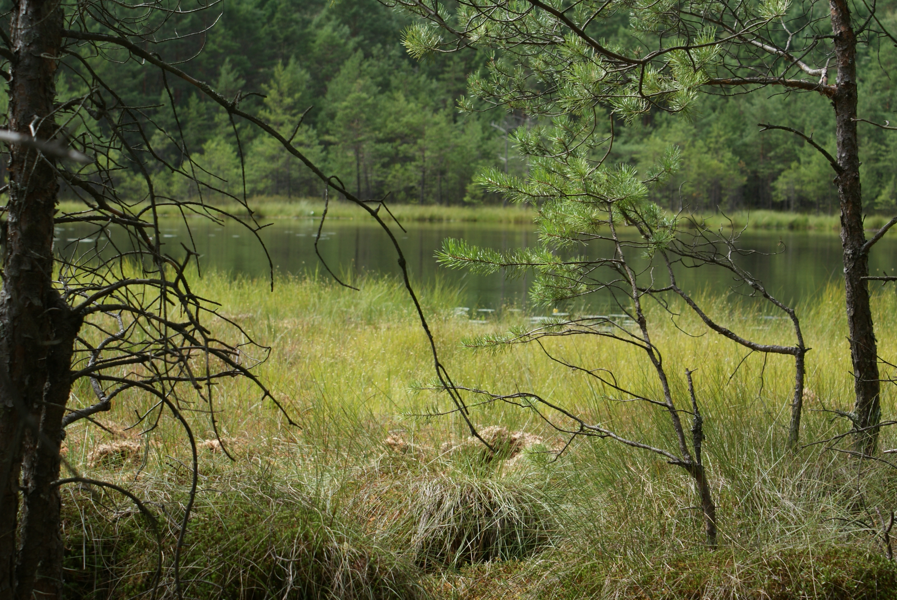 Ścisły rezerwat przyrody Dury na terenie Wdeckiego Parku Krajobrazowego.